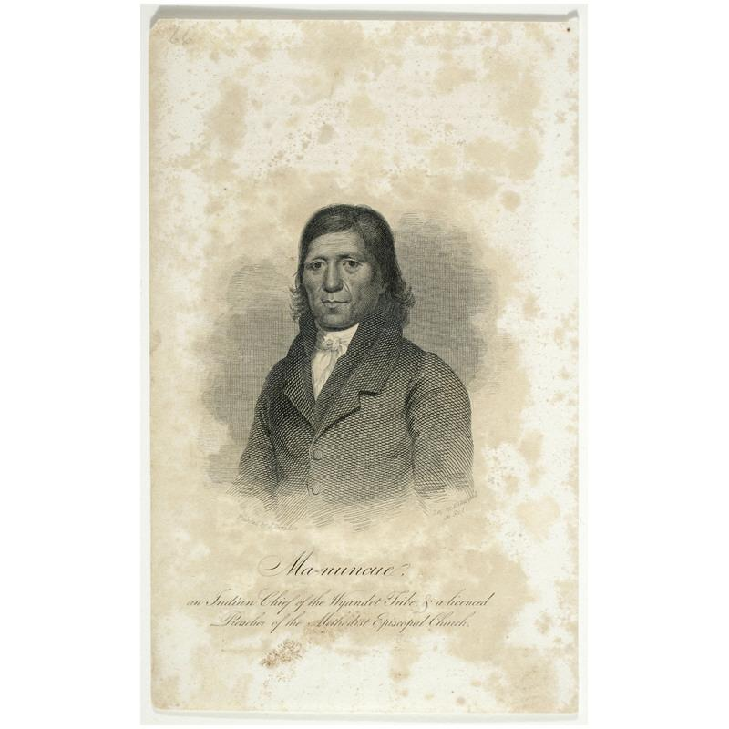 Asher Brown Durand: Ma Nuncue (grabado basado en un retrato de John Paradise). Sociedad Histórica de Nueva York.